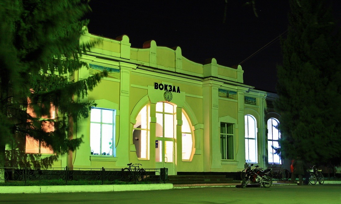 Залізнична станція Верхівцеве